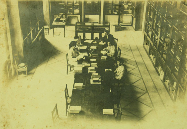 Լիբանանի ազգային գրադարան